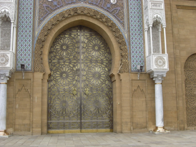 Eingang zur Großen Moschee in Tanger.